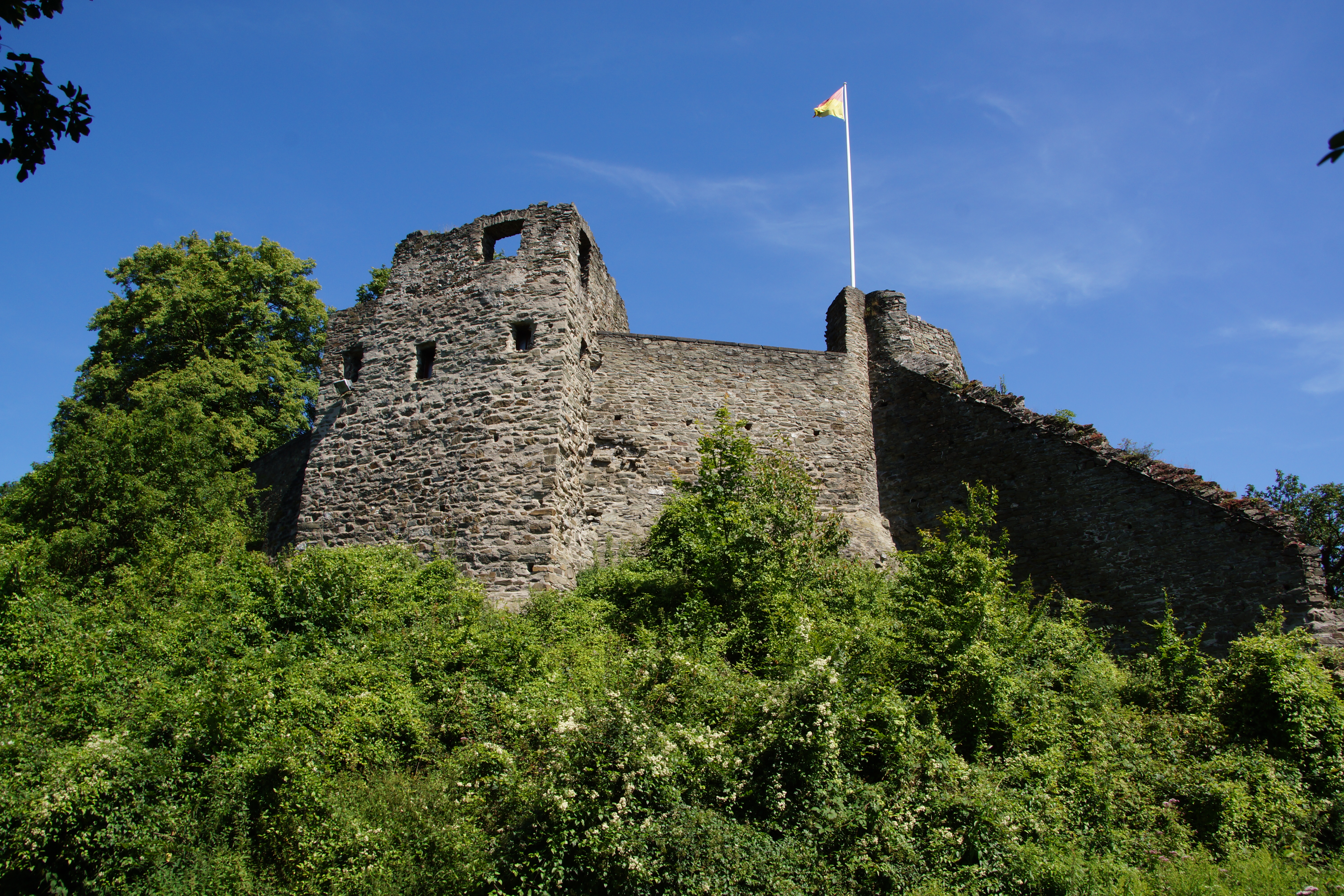 Burg Sayn in Bendorf